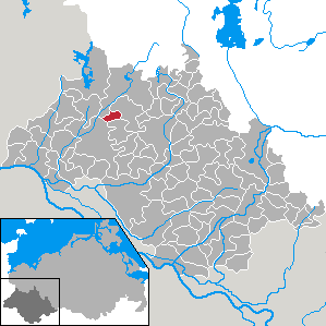 Lehsen in Mecklenburg-Vorpommern - district Ludwigslust